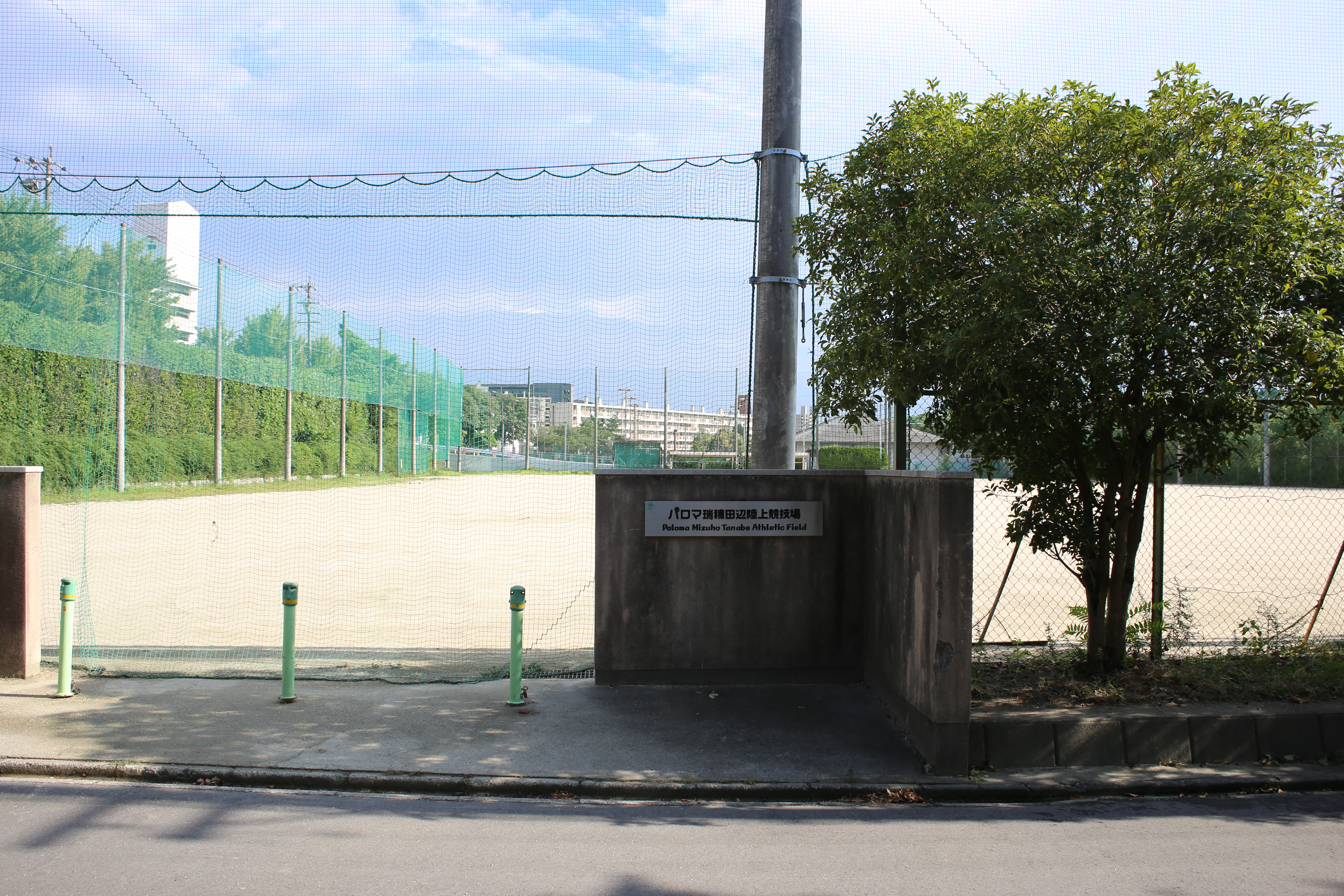 名古屋市瑞穂区の瑞穂公園田辺陸上競技場